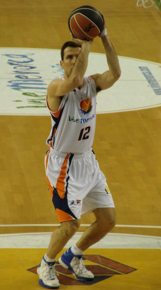 Nacho Rodriguez-Menorca Basquet 06/07